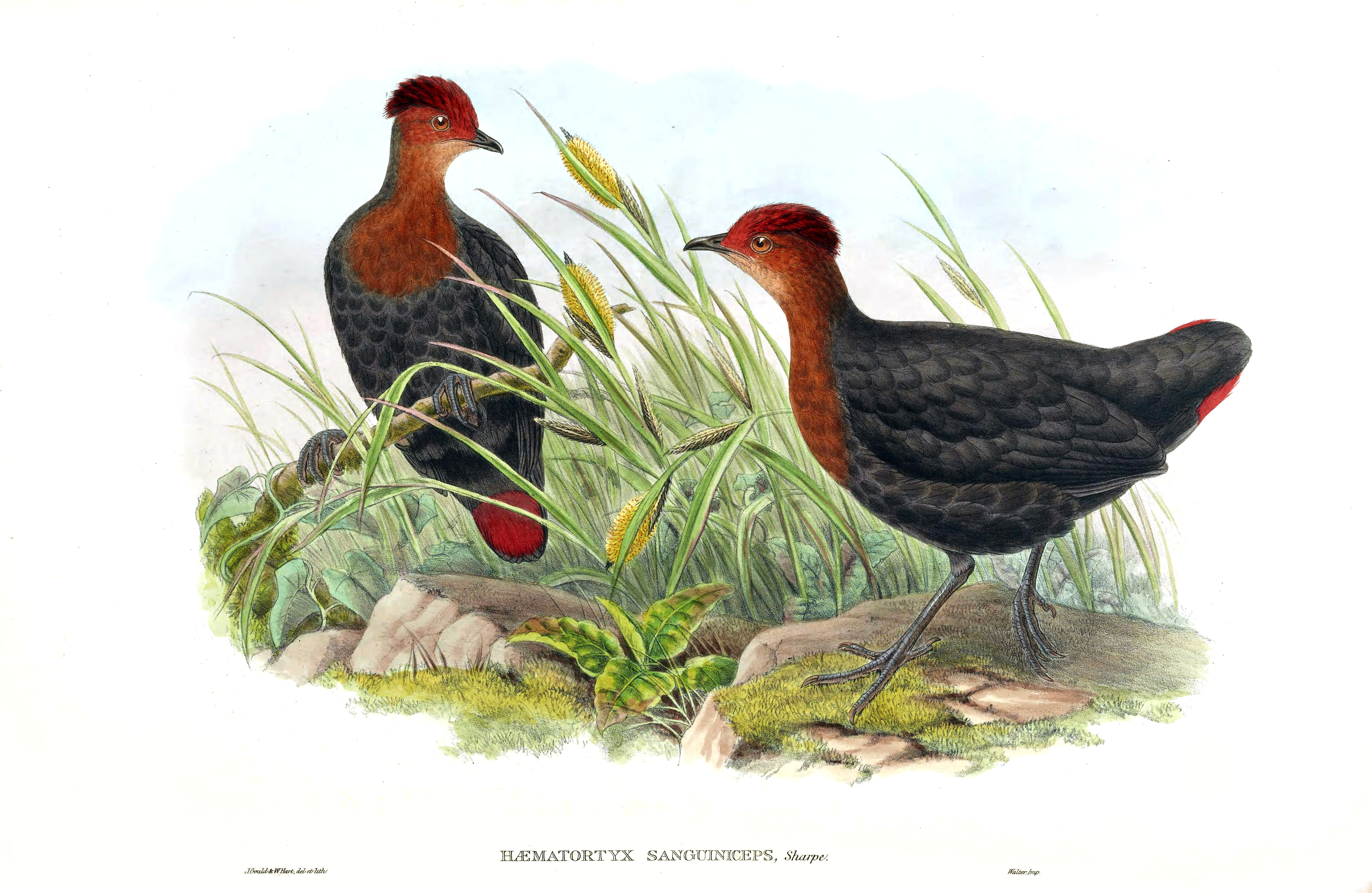 Haematortyx sanguiniceps